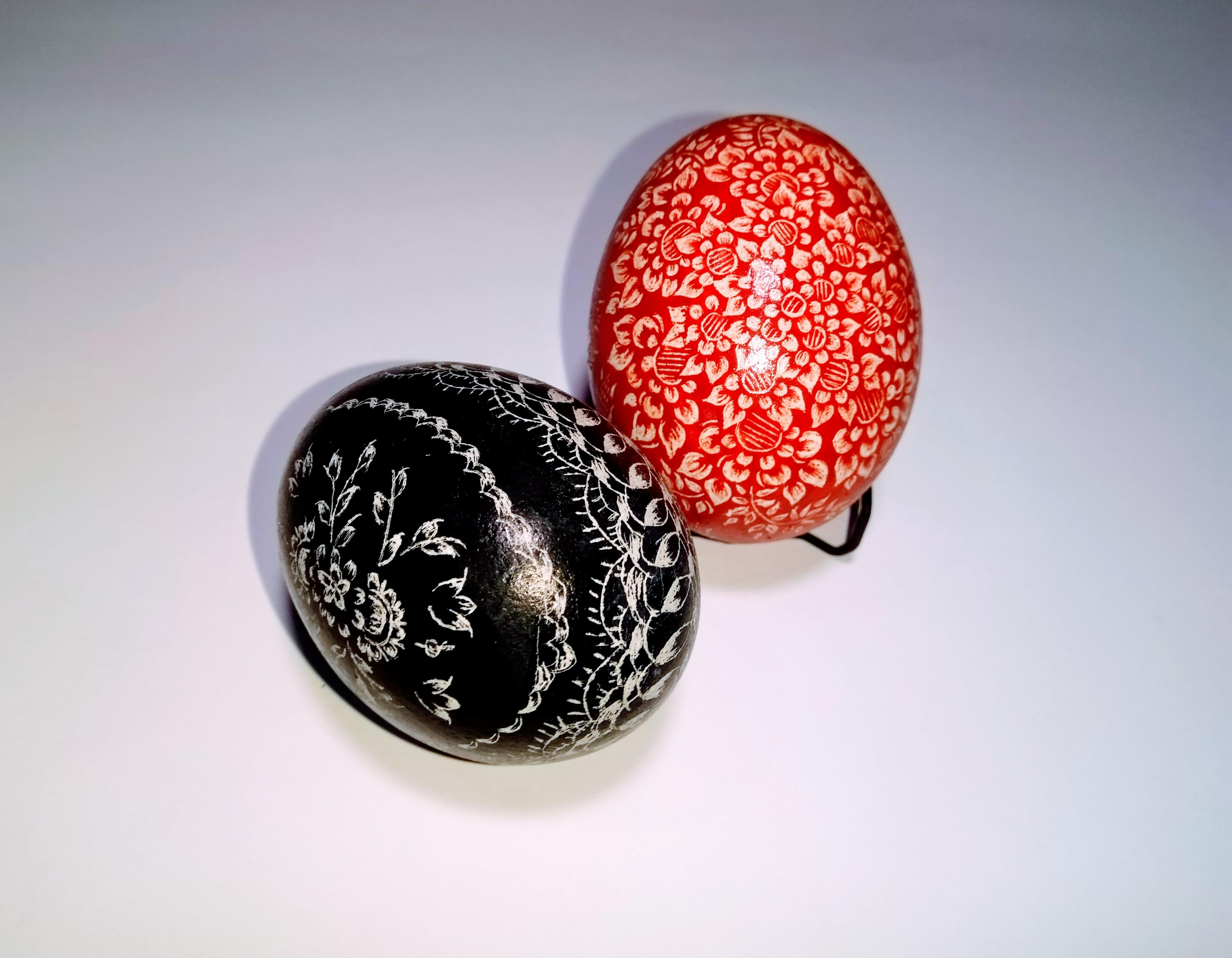 Dwie „kroszonki” ze Śląska Opolskiego mogące być porównane do tzw. „drapanki”. Tradycyjny dla regionu rodzaj jajka wielkanocnego jak i element święconki wielkosobotniej.